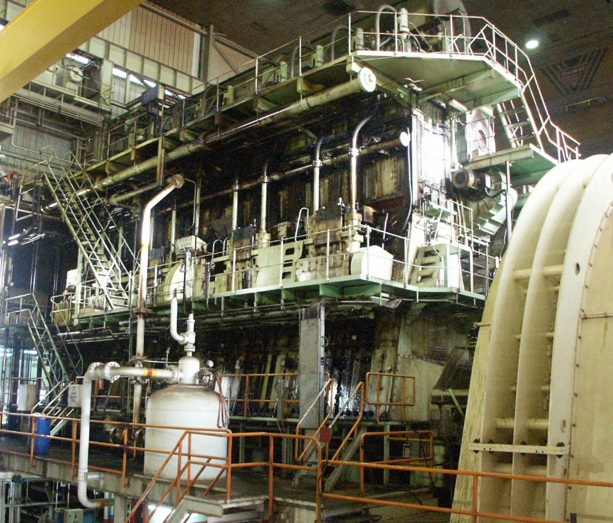 9-Zylinder Zweitakt-Reihen-Dieselmotor (SULZER 9RTA76, span. Lizenzbau, ca. 25000 kW), stationär aufgestellt als Generatorantrieb in einem spanischen Kraftwerk